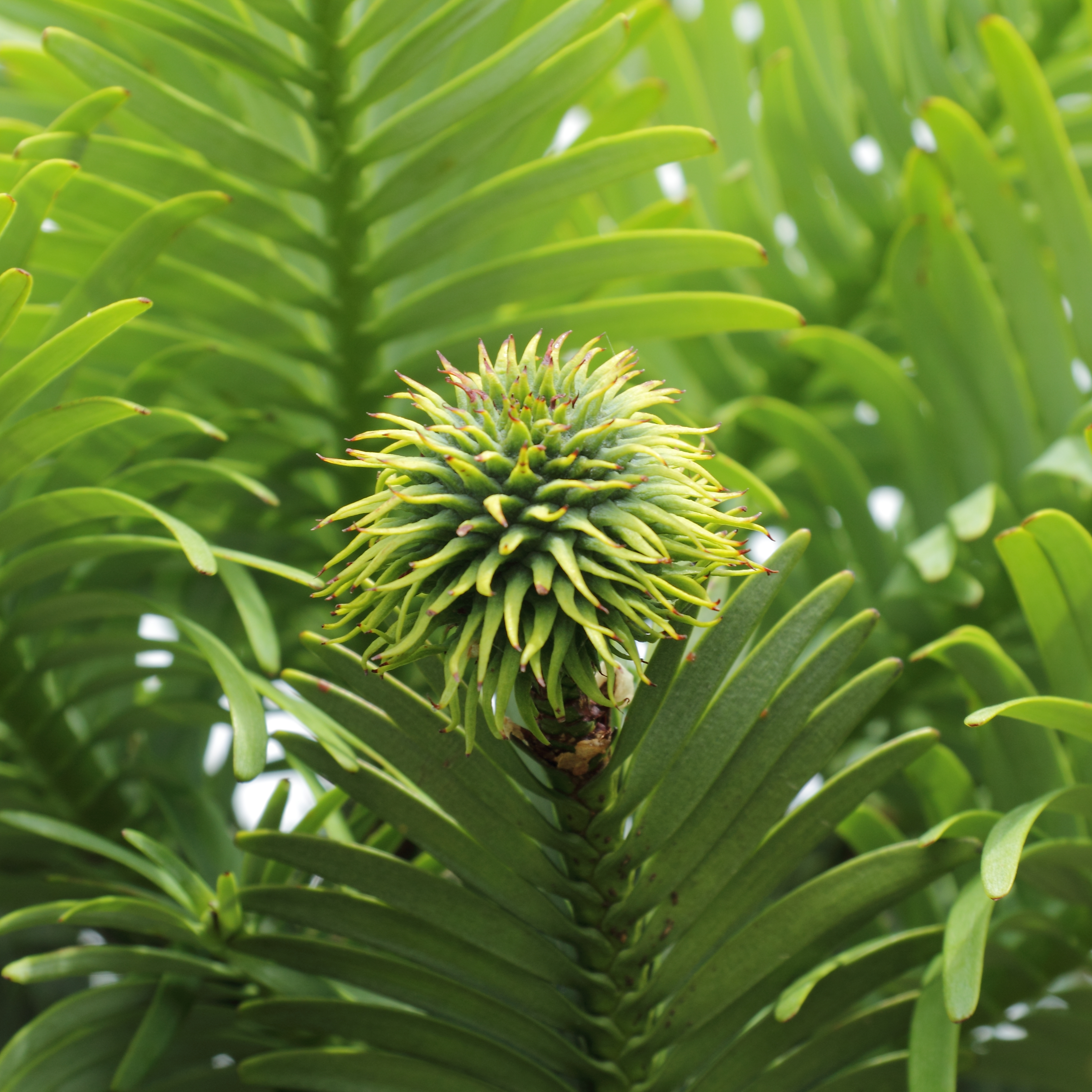 Wollemia nobilis, identifierad med hjälp av befintlig skylt vid Kew Gardens, London.